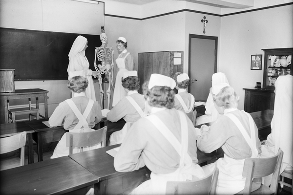 St. Josephsøstre driver undervisning i sykepleie på Vor Frue Hospital, tilknyttet nonnenes sykepleierhøyskole på Nesøya. Datert 1962.